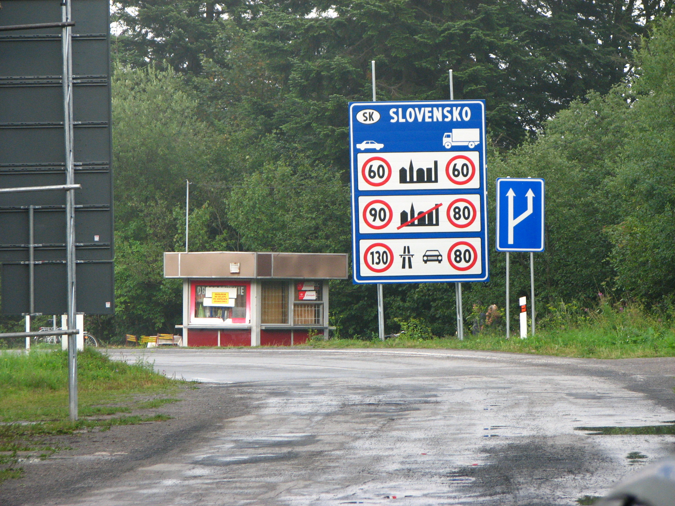 Przejście graniczne polsko-słowackie Muszynka-Kurov. Obecnie zlikwidowane (na mocy Traktatu z Schengen). Informacja na tablicy nieaktualna - prędkość na Słowacji w obszarze zabudowanym wynosi teraz 50km/h oraz jazda na światłach przez całą dobę.